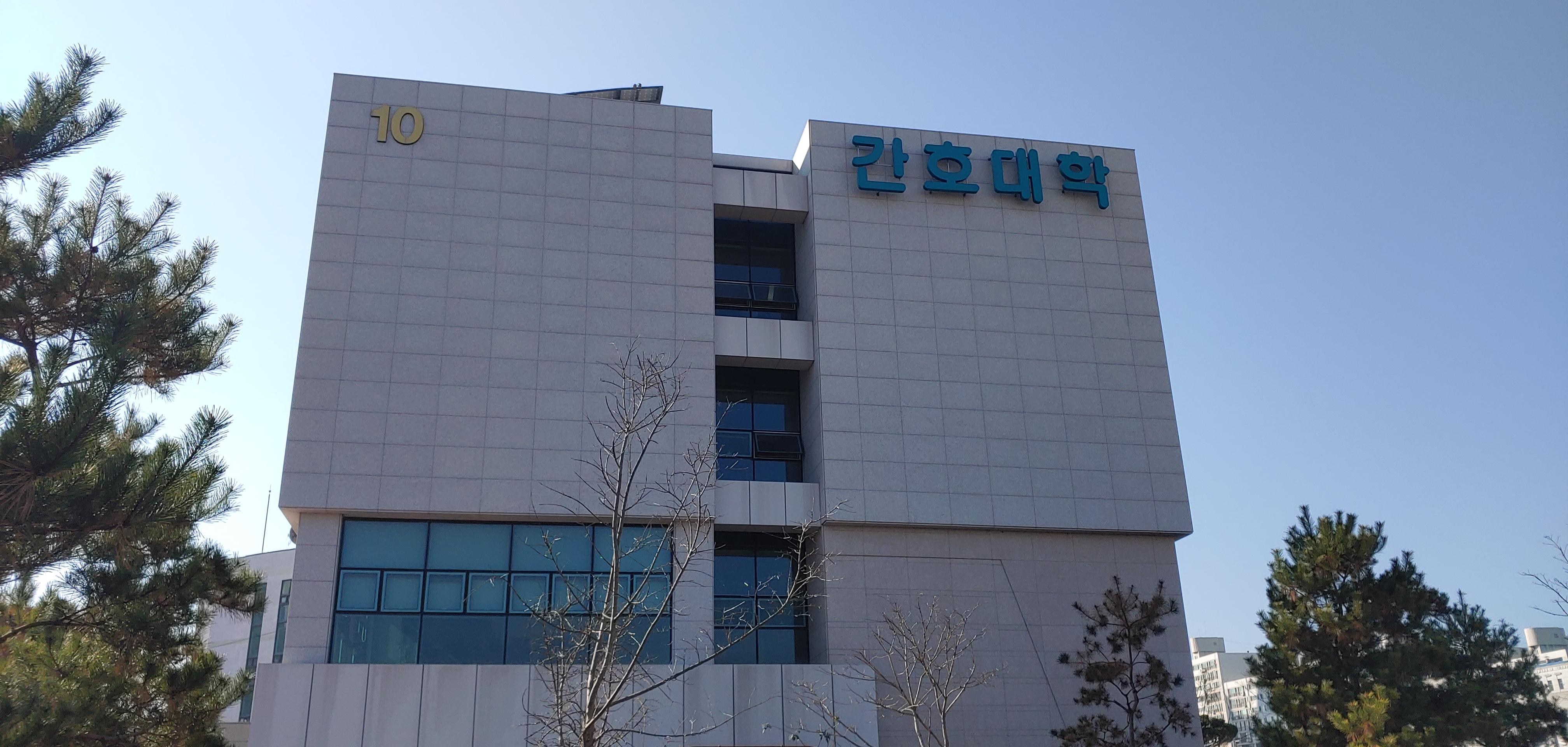 경상대학교 간호대학